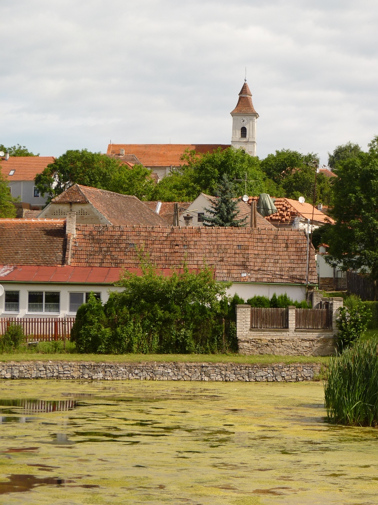 Městys Lukov v okresu Znojmo.